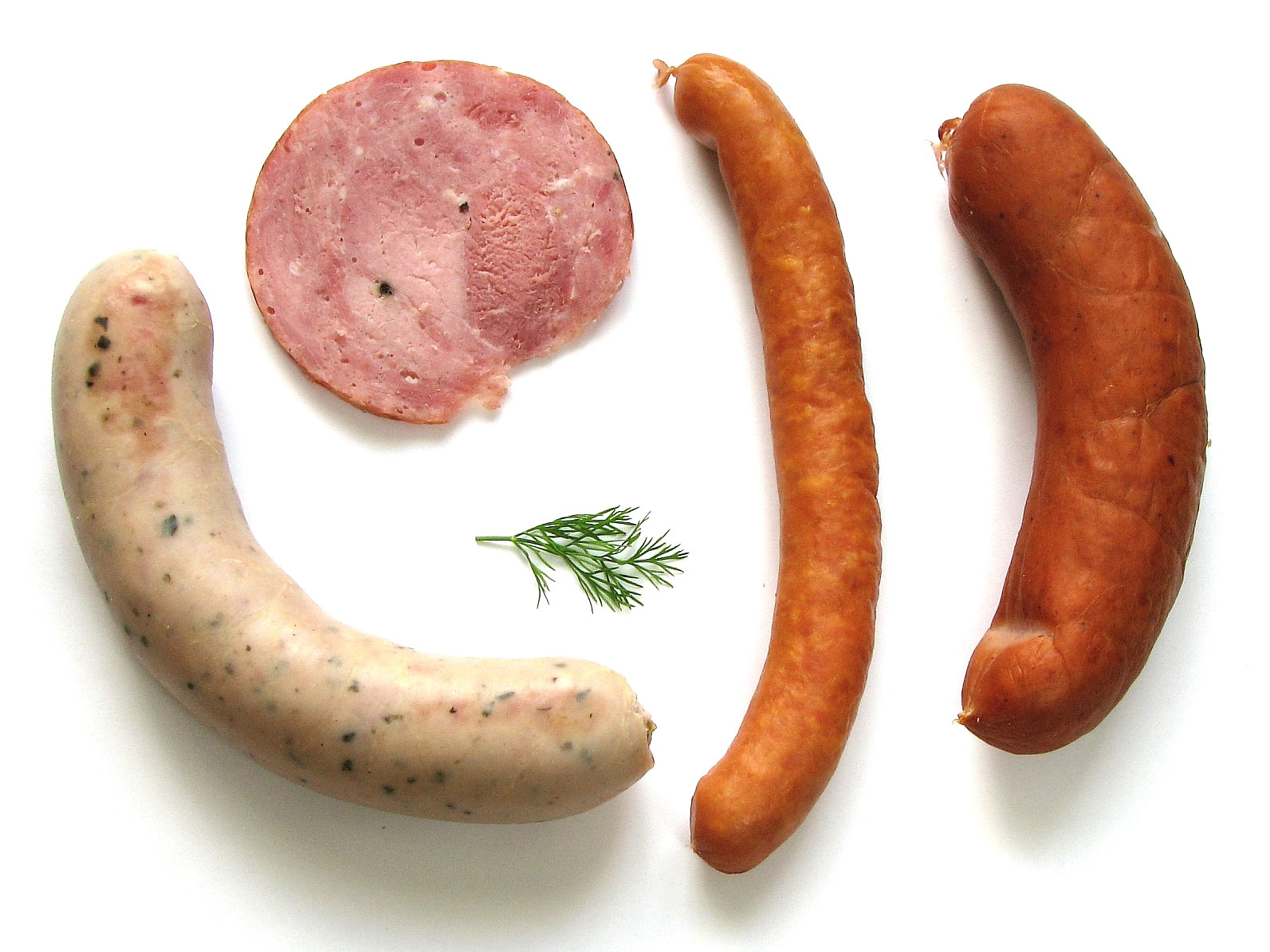 PETE'S FAVOURITE THAUTHAGE, kiełbasa